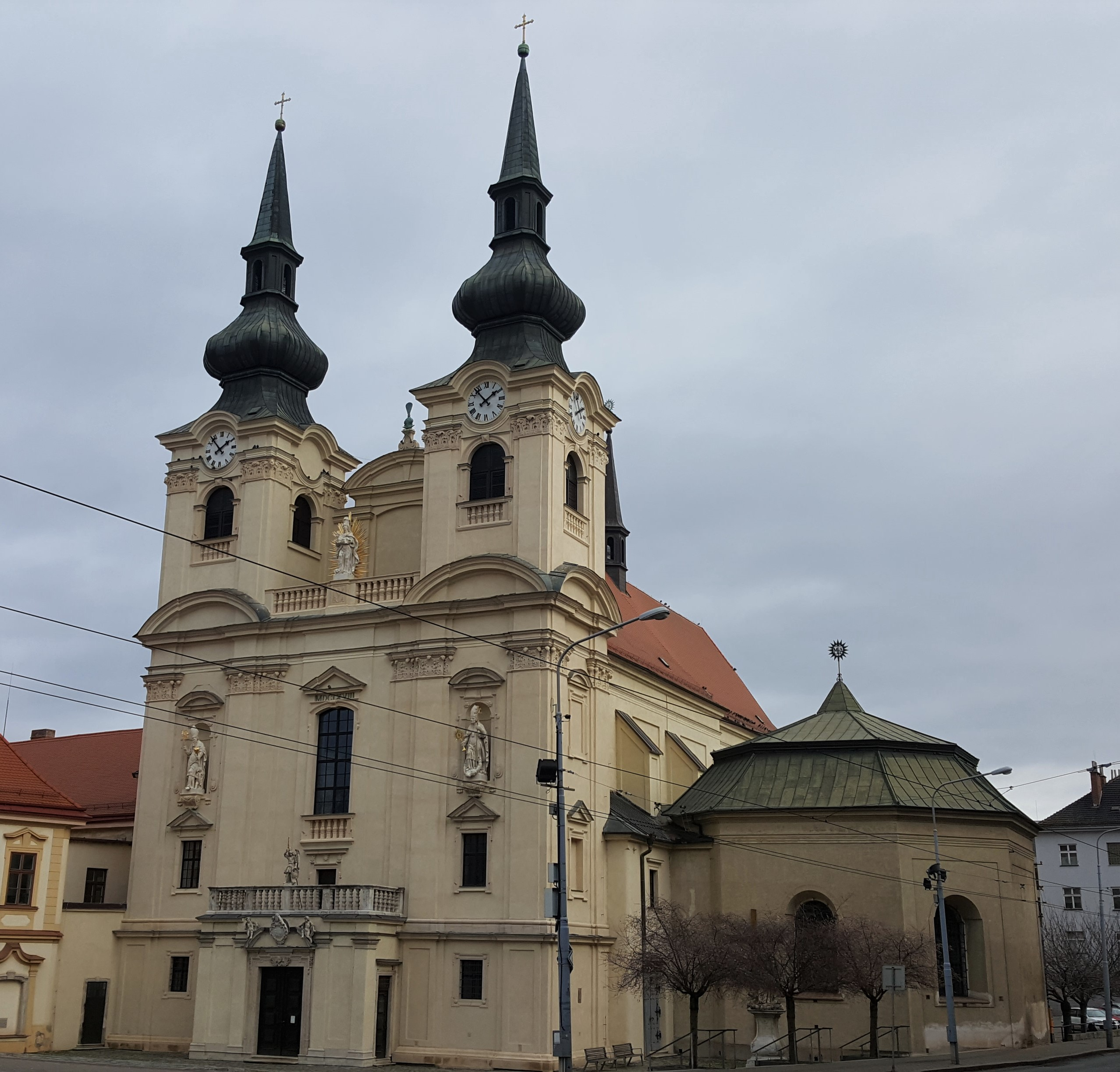 Kostel Nanebevzetí Panny Marie, Brno-Zábrdovice - Giovanni P. Tencalla, Mořic Grimm (1661–1668, 1755)